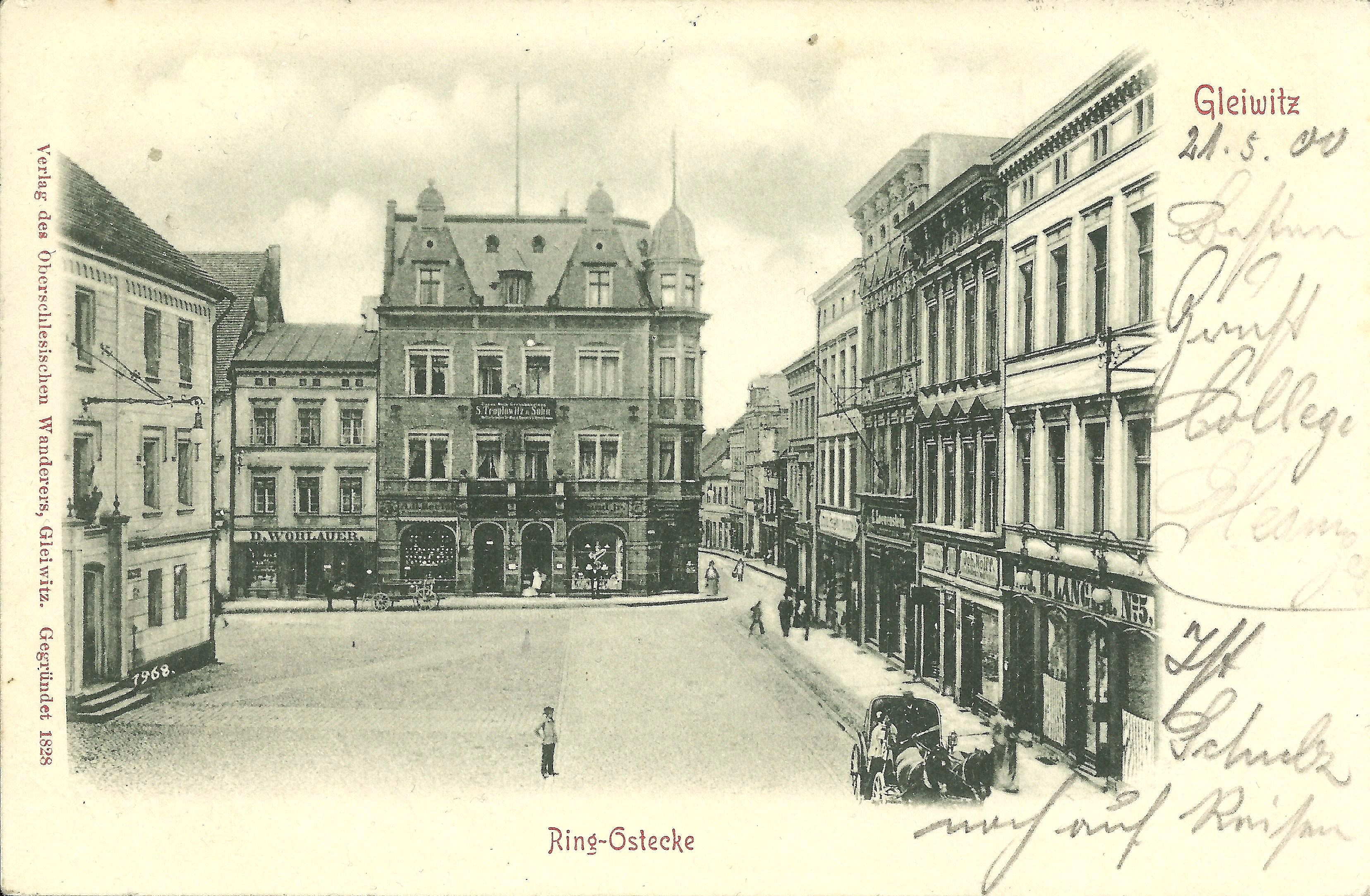 Alte Ansichtskarte von vor 1900.